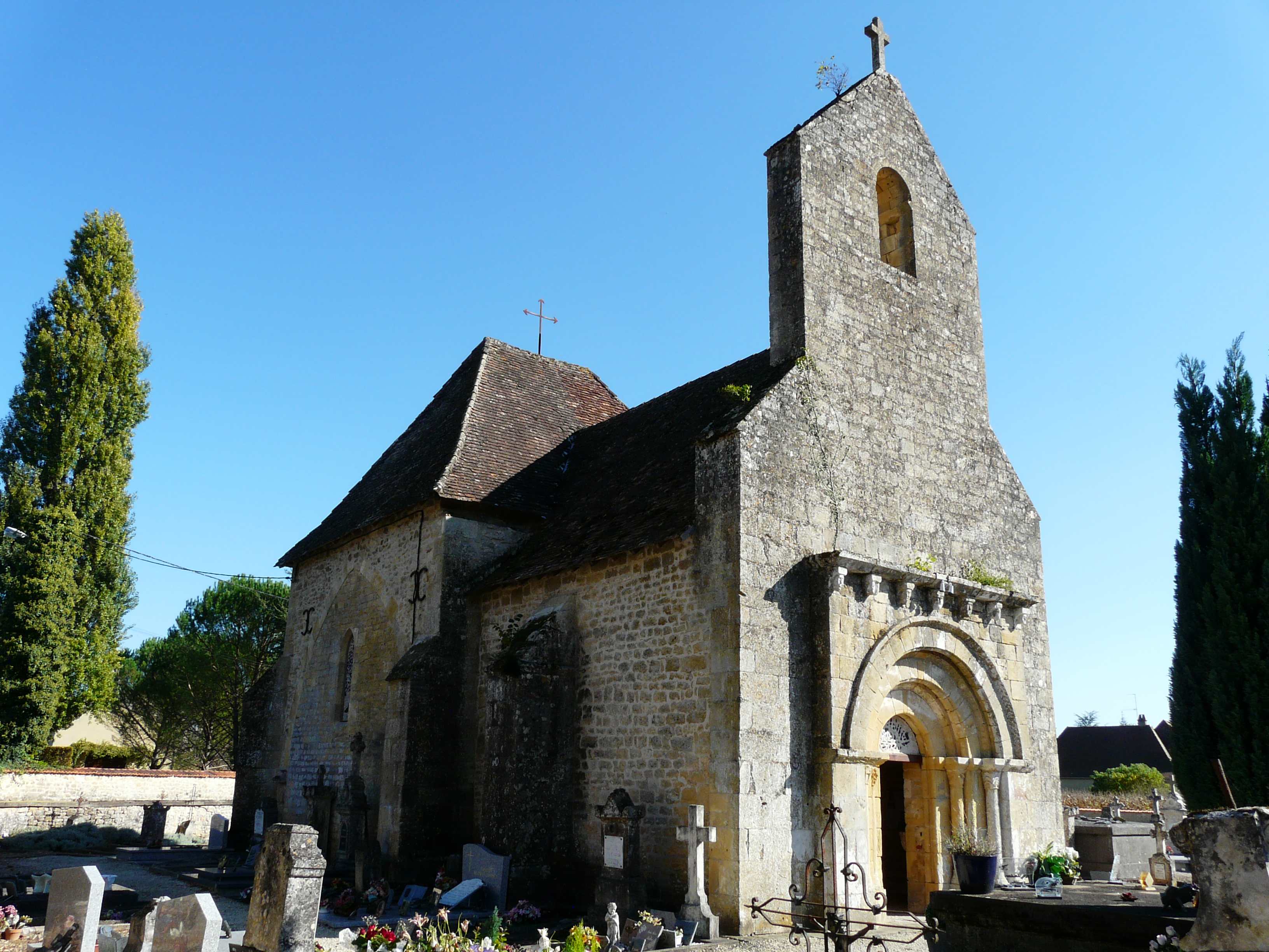 L'angle nord-ouest de l'église Saint-Hilaire, Trémolat, Dordogne, France.